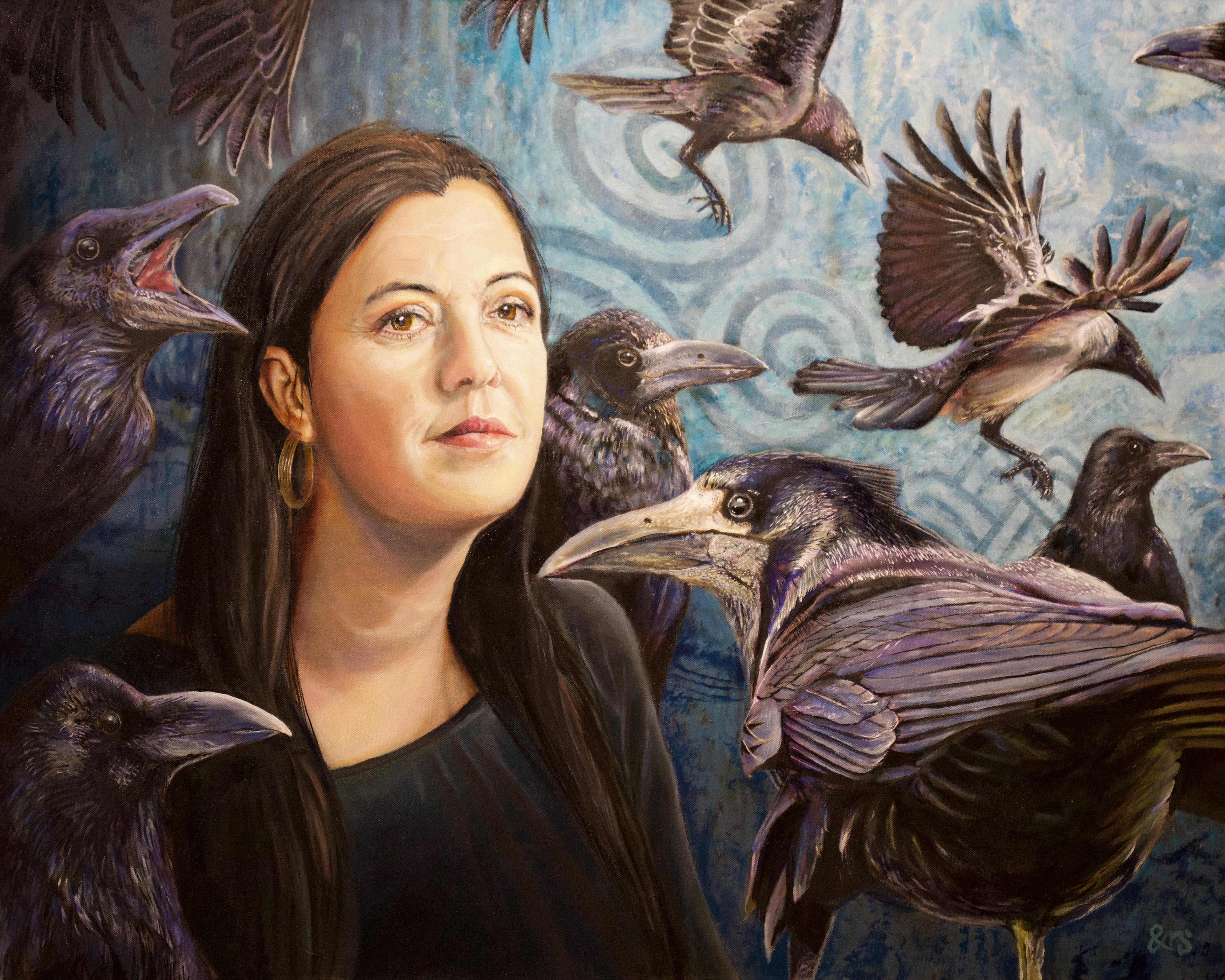 Foto af Portrætmaleriet #8E, (Mette Finderup), Akryl og olie på lærred 100x80cm, 2018, anders dyhr.